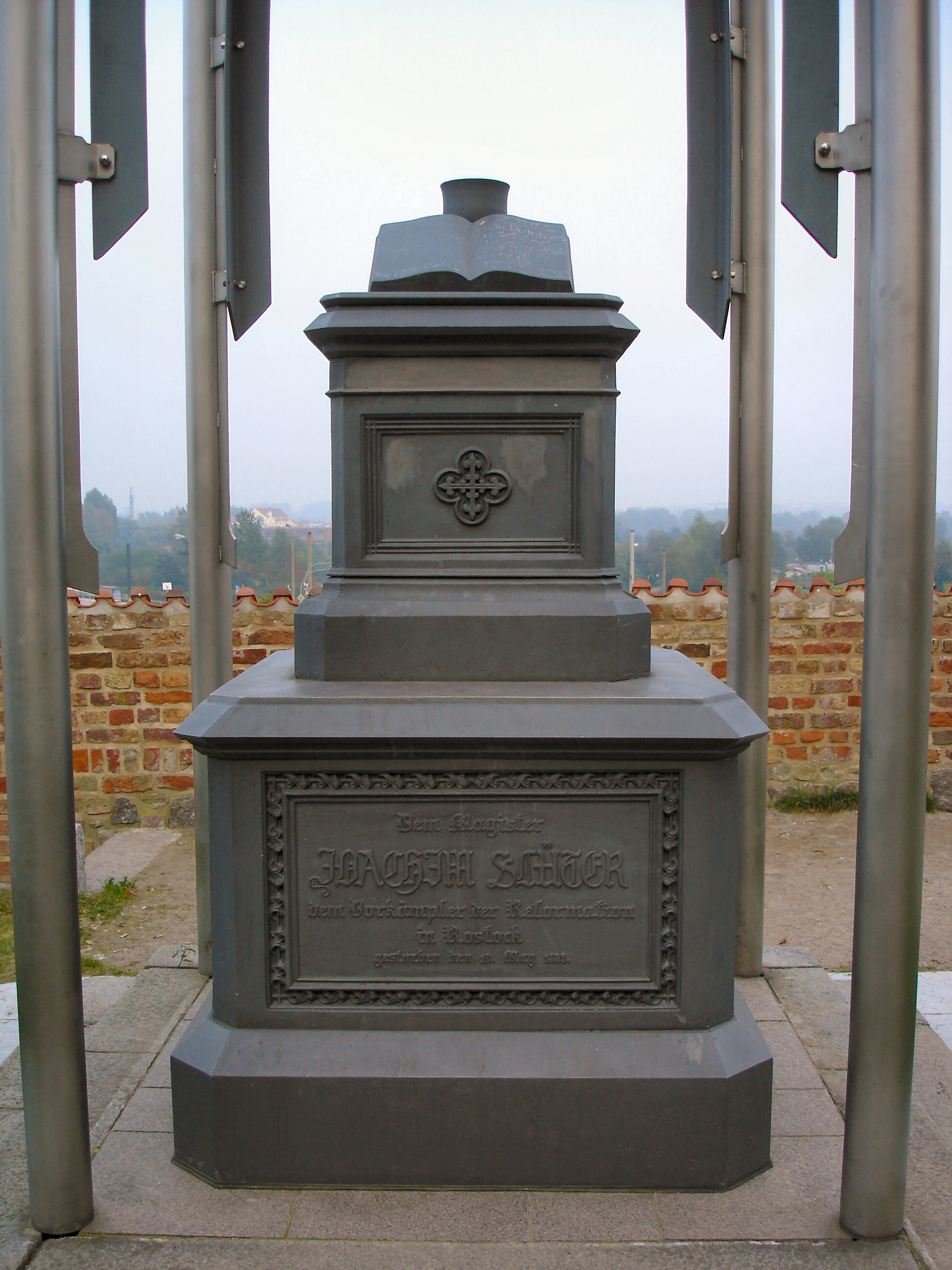 Slüterdenkmal in Rostock / Memorial of Joachim Slüter in Rostock